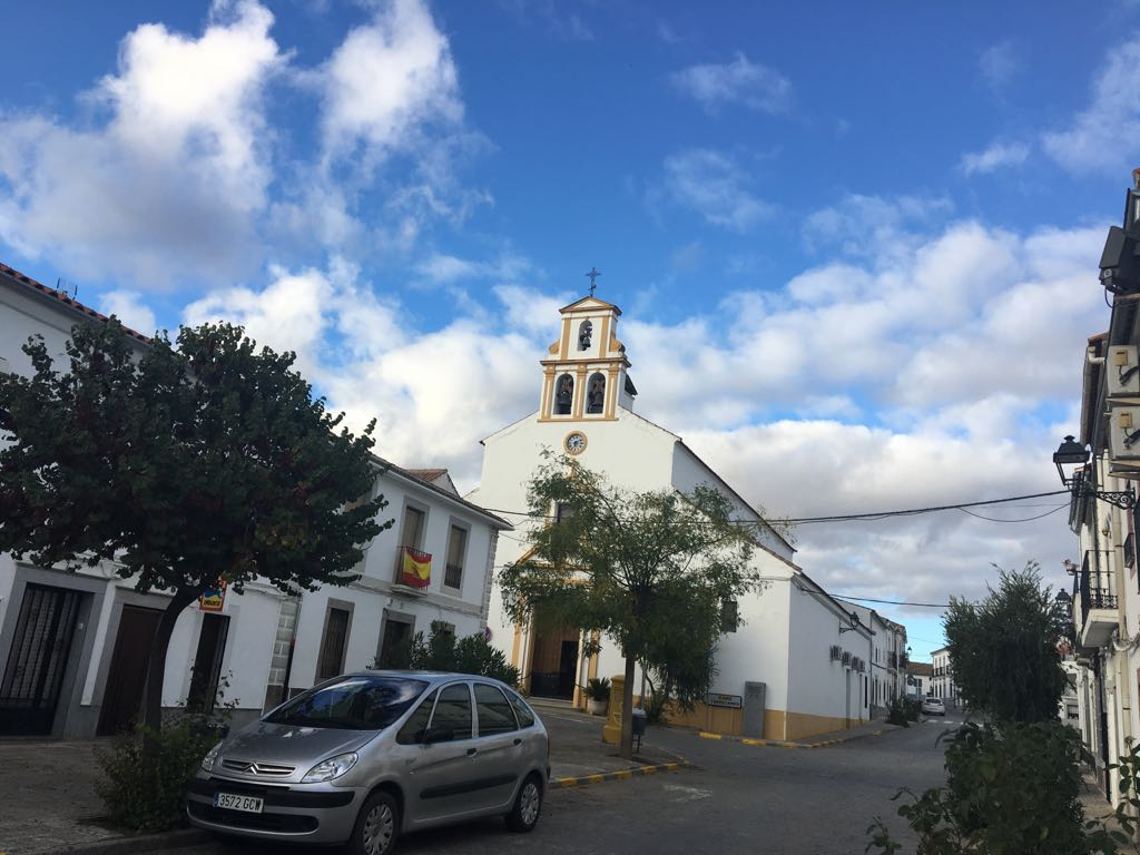 Conquista